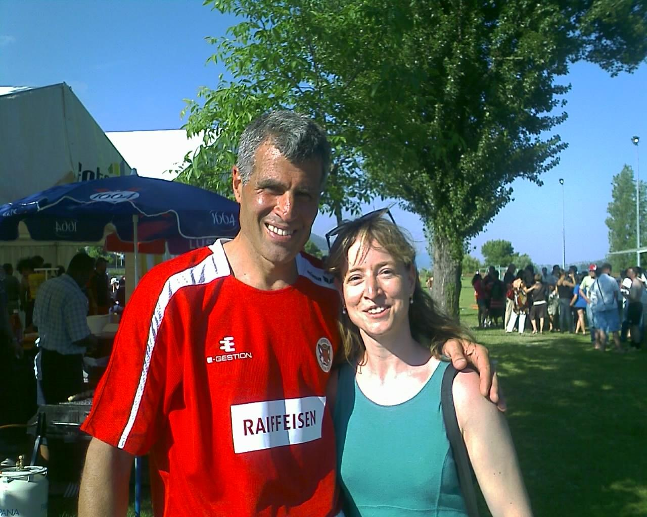 Photo lors d'un match exhibition